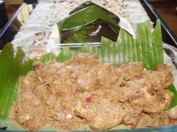 Tribun news